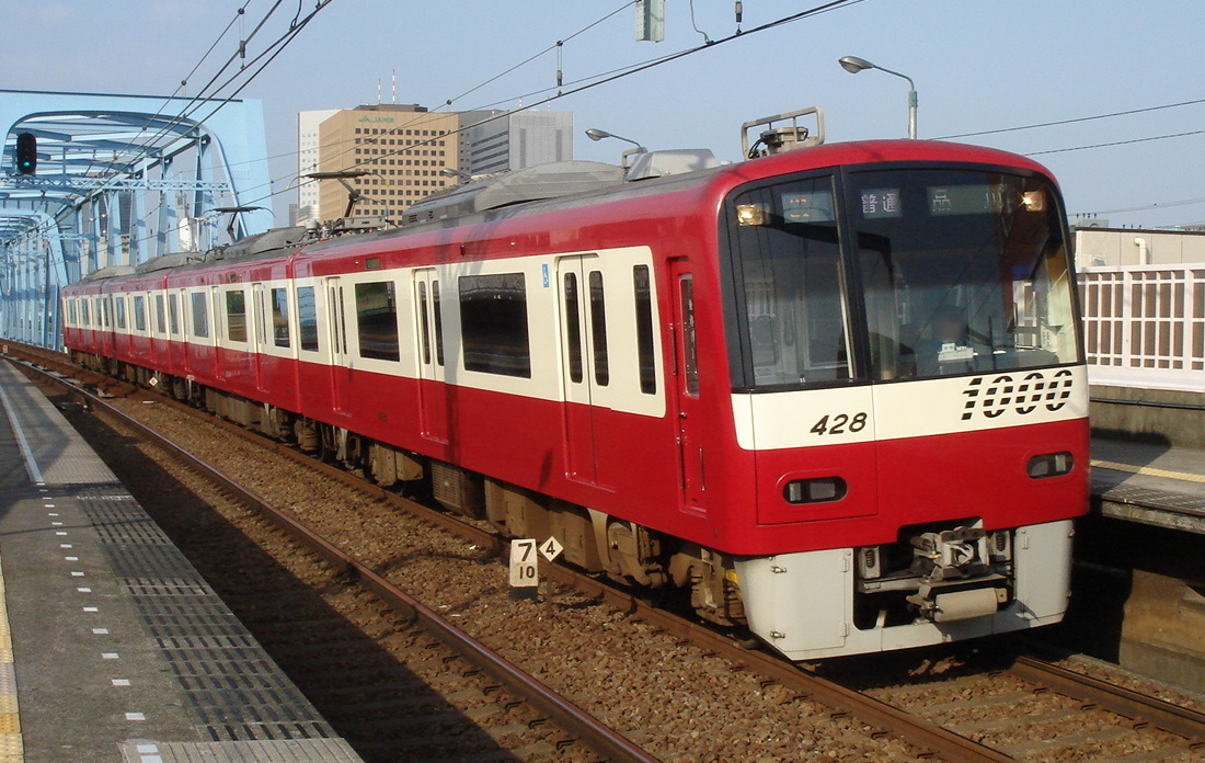 京急1000形電車（2代） 2006年5月21日に投稿者↑ＰＯＮが六郷土手駅で撮影 一部編集の上で2006年5月22日にアップロード